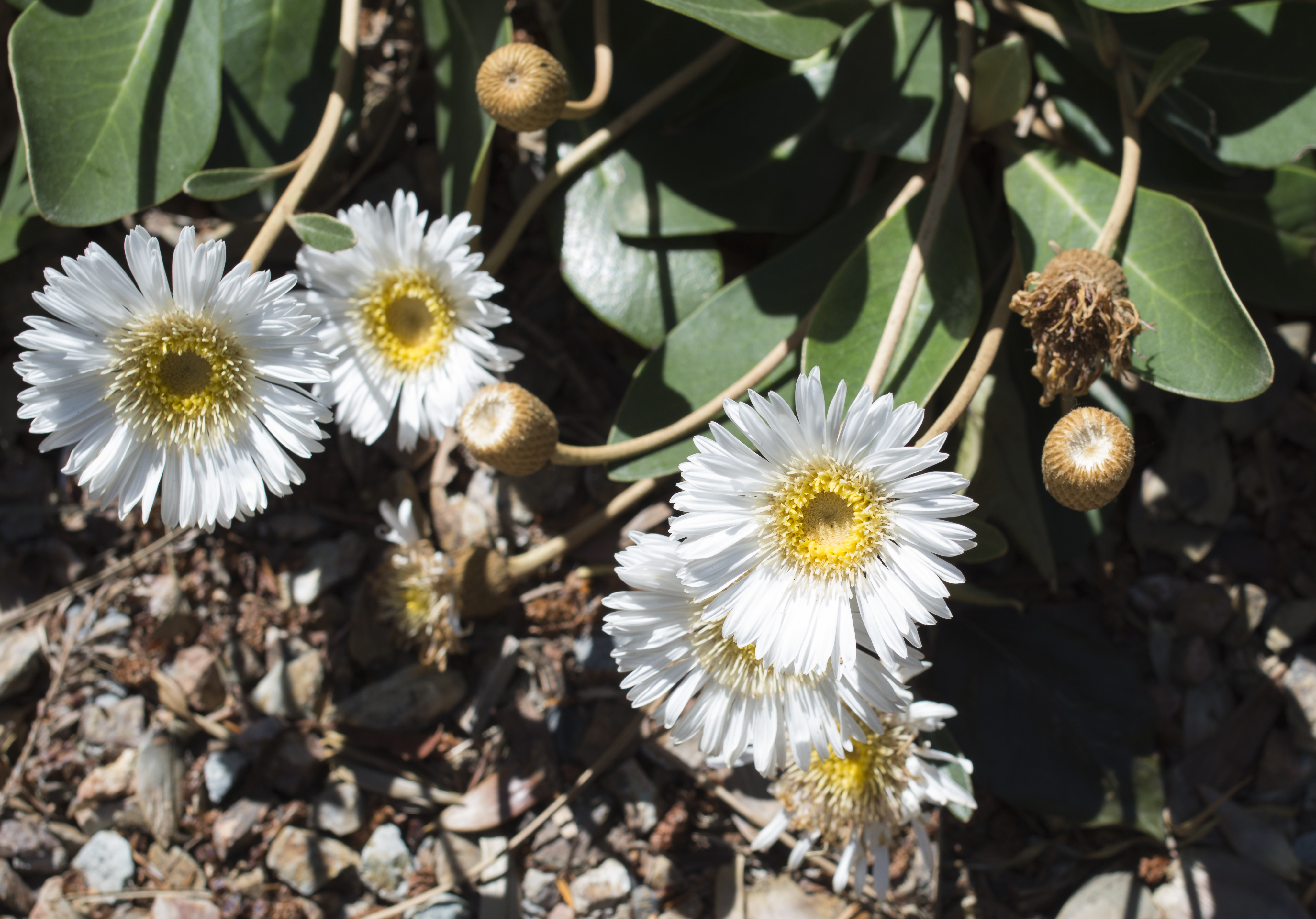 Pachystegia rufa - Fleurs - Jardin botanique de Christchurch